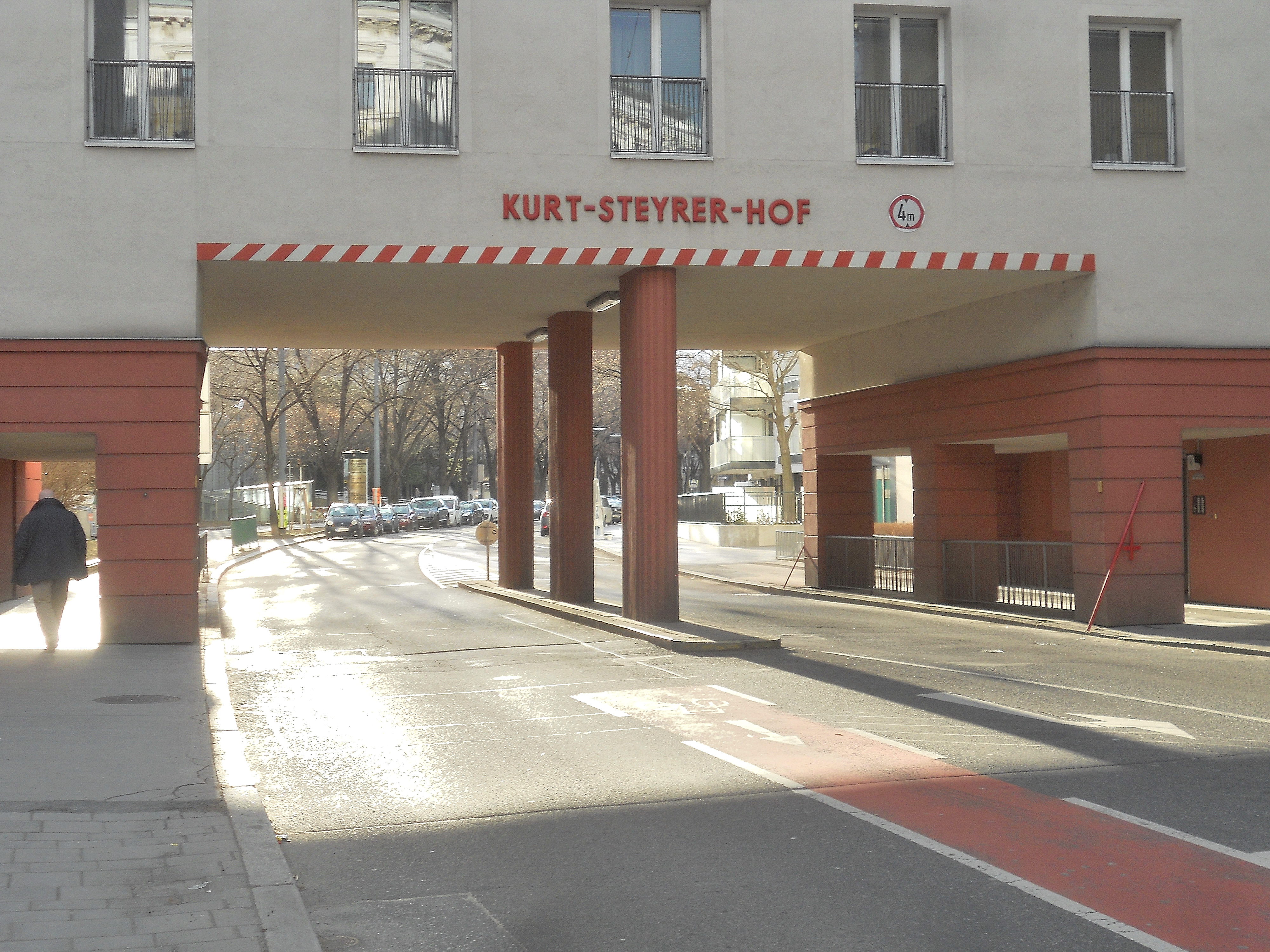 Durchfahrt durch den Kurt-Steyrer-Hof zur Neulinggasse